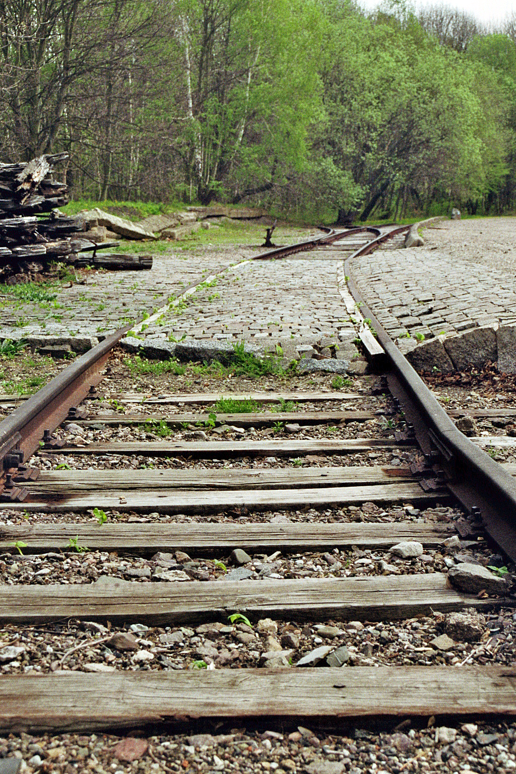 Wiederfreigelegter und teilrekonstruierter Abschnitt der Bahnrampe am KZ Buchenwald. Die zuletzt für das sowjetische Sonderlager genutzte Bahnrampe. Während der NS-Zeit – seit Anfang 1944 – kamen hier u.a. die Züge mit den Lagerinsassen an. Von hier aus gingen auch Züge nach Auschwitz ab. Die zehn Kilometer lange Buchenwaldbahn wurde im Frühjahr 1943 von KZ-Häftlingen in nur drei Monaten errichtet. Sie diente zunächst der Versorgung der nebenan liegenden Rüstungsfabrik. Zustand 2012.